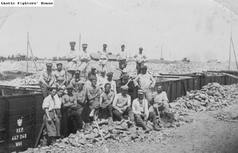 חברי תנועת החלוץ הצעיר עובדים במחצבה בהכשרת קלוסובה 2